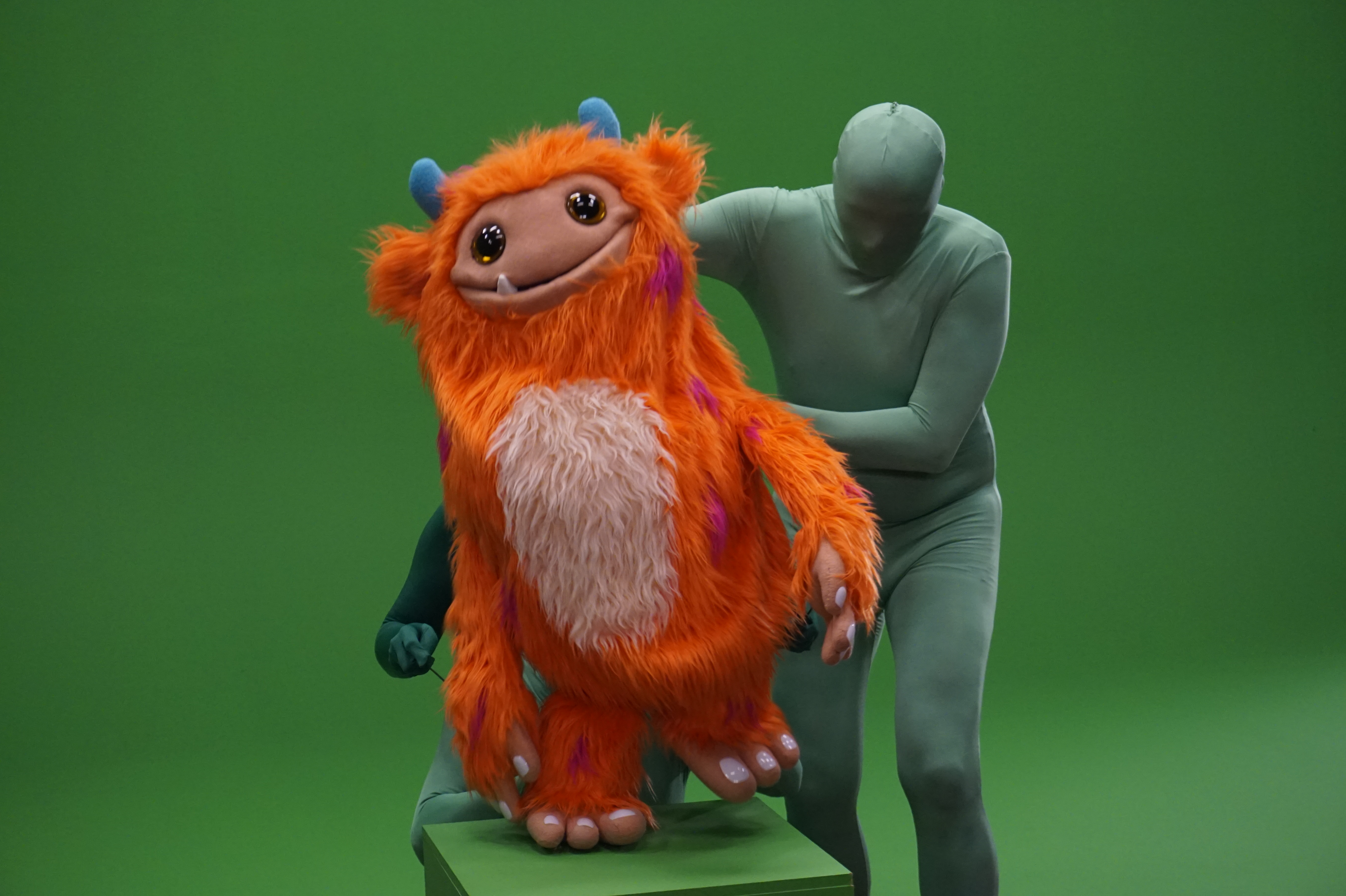 Escenes del rodatge de la sèrie de titelles (muppets) "Júlia i Gilbert", de Famazing Entertainment per a À Punt Mèdia.